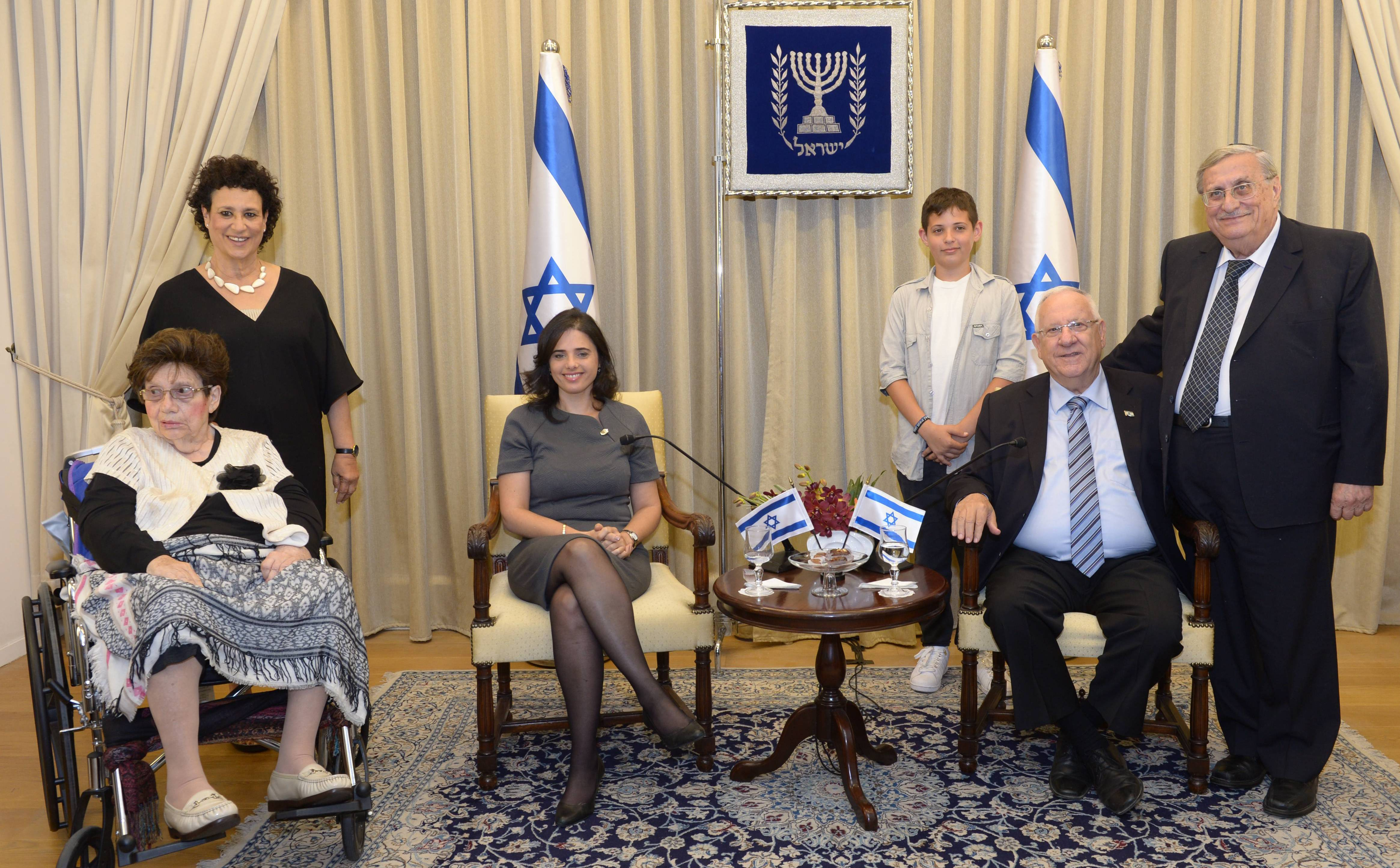 נשיא מדינת ישראל בטקס זוכי המשפט העברי עם השופט יעקב טירקל ונכדו, ויהודית קירשנבאום, אלמנתו של פרופ' אהרון קירשנבאום ובתו. במרכז השרה איילת שקד.